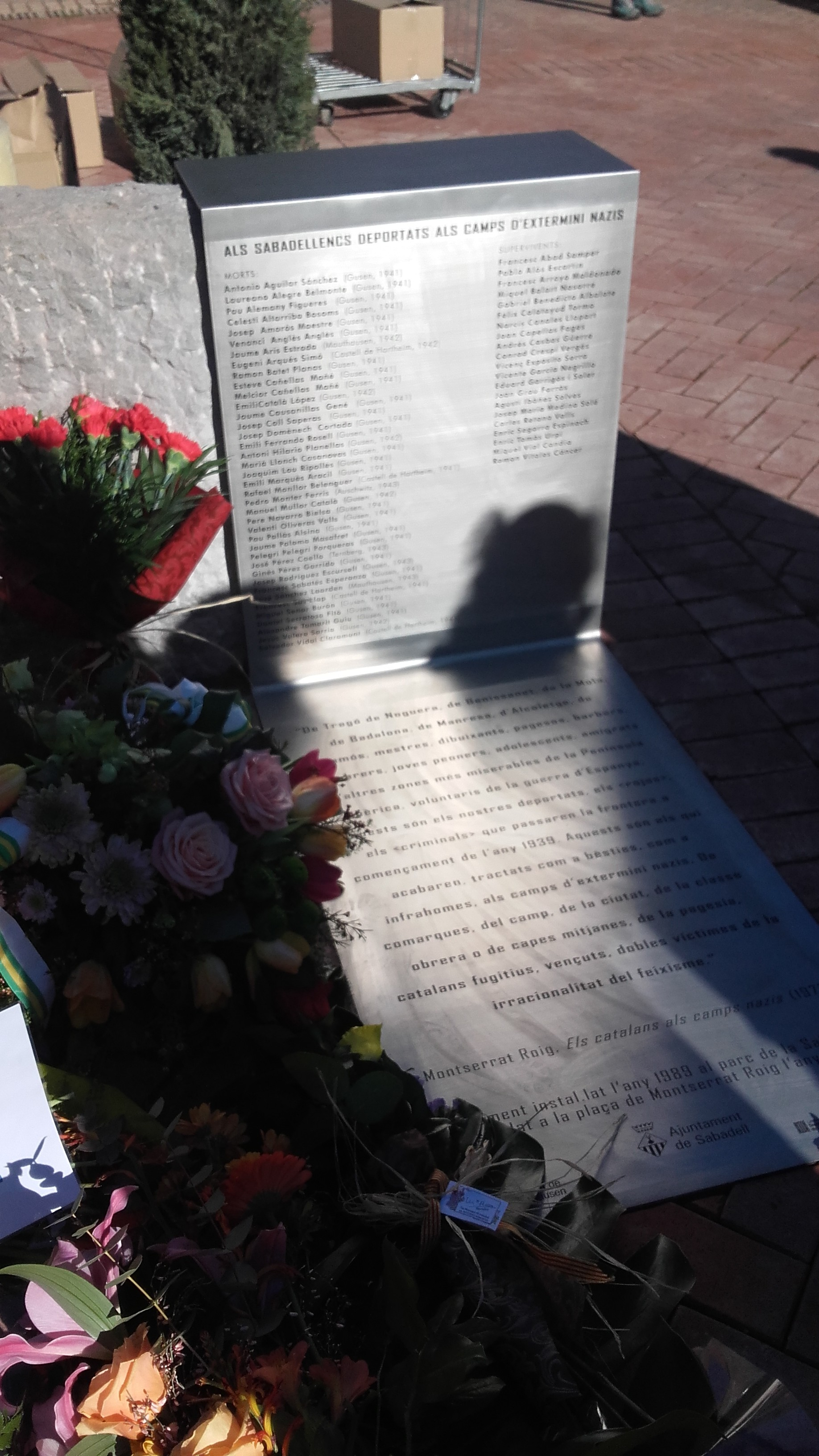 Monuments als sabadellencs deportats als camps d'extermini nazis